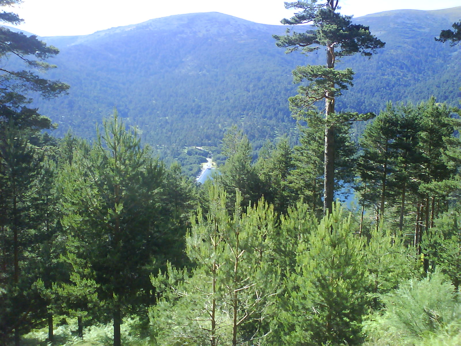 Valle del río Moros, abajo en el fondo del valle se aprecia el embalse de Las Tabladillas y al fondo el Pasapan, pies de la Mujer Muerta. El Espinar, Segovia, España.